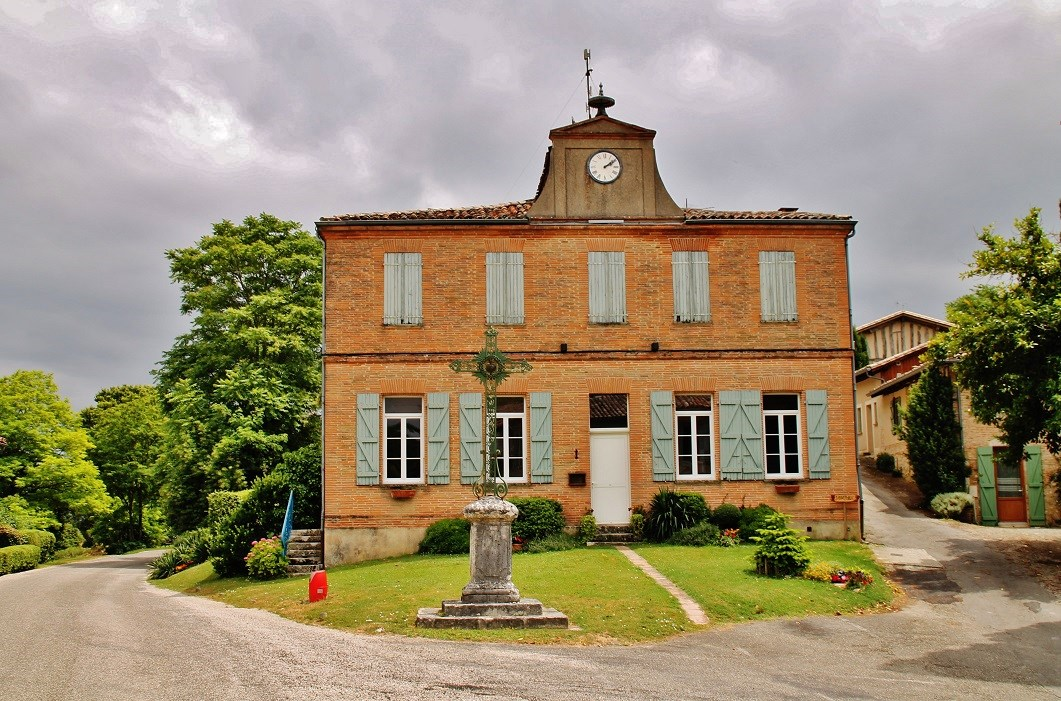 La Mairie